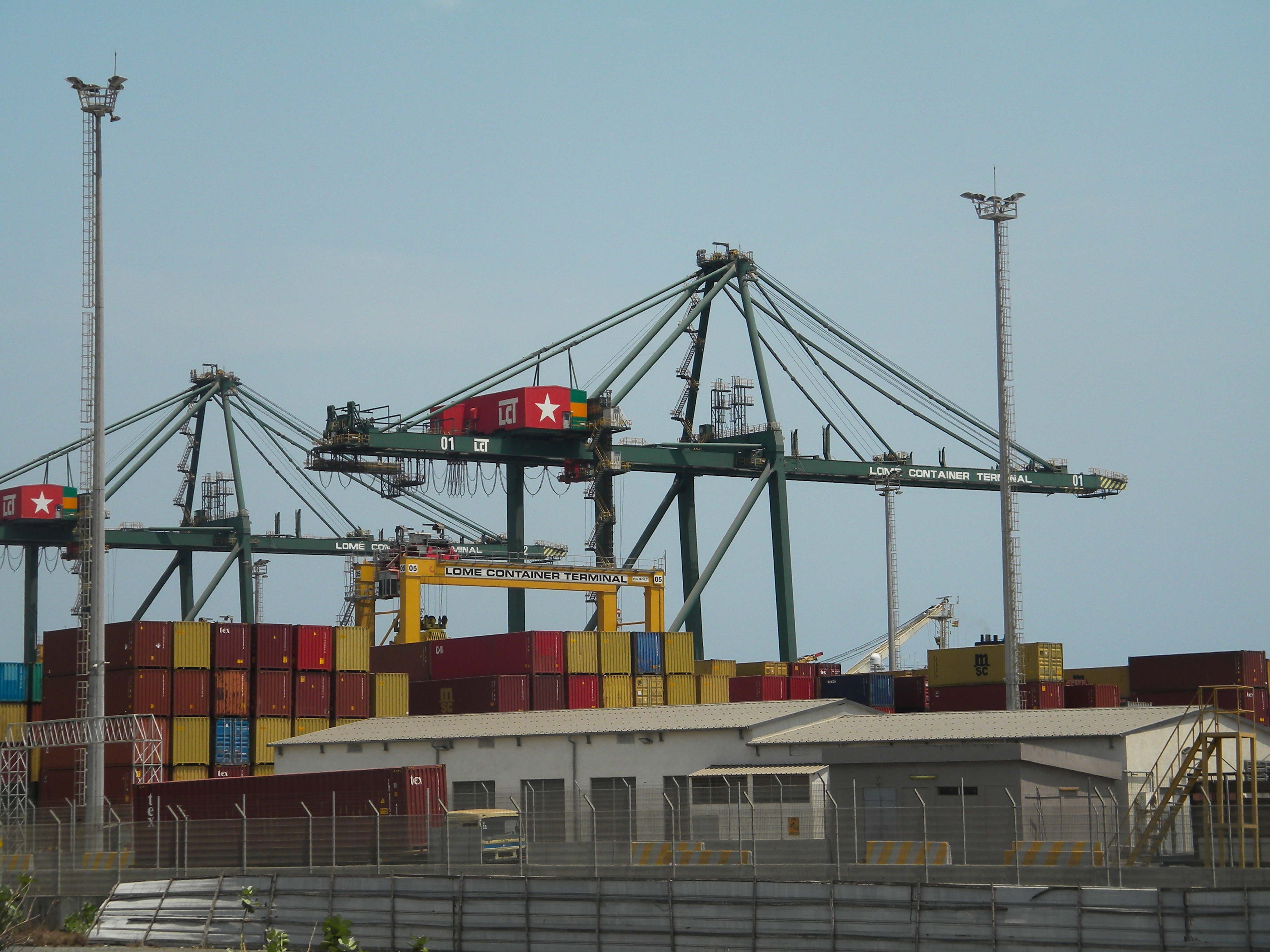 Pour le transport des biens, les ports africains déchargent des containers contenant des marchandises. This is an image with the theme "Africa on the Move or Transport" from: Togo